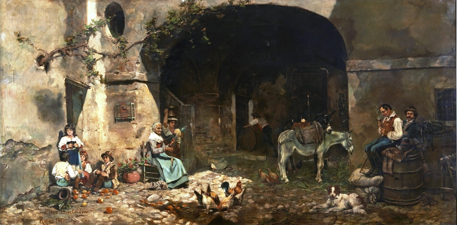 La obra representa el patio de un parador (venta, posada, mesón o fonda) de España.